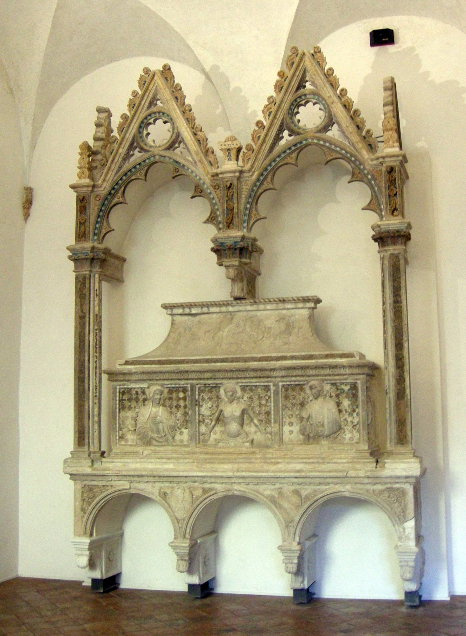 Palazzo Ducale di Urbino - Galleria Nazionale delle Marche - MIBAC This is a photo of a monument which is part of cultural heritage of Italy.